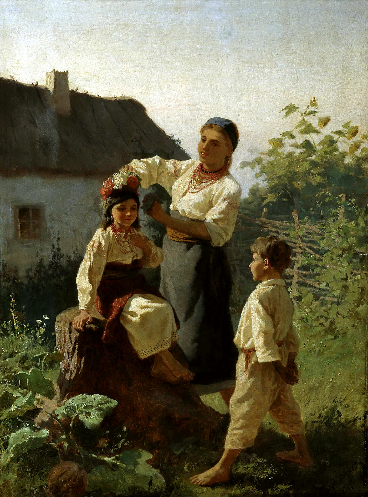 "Одягають вінок", олія